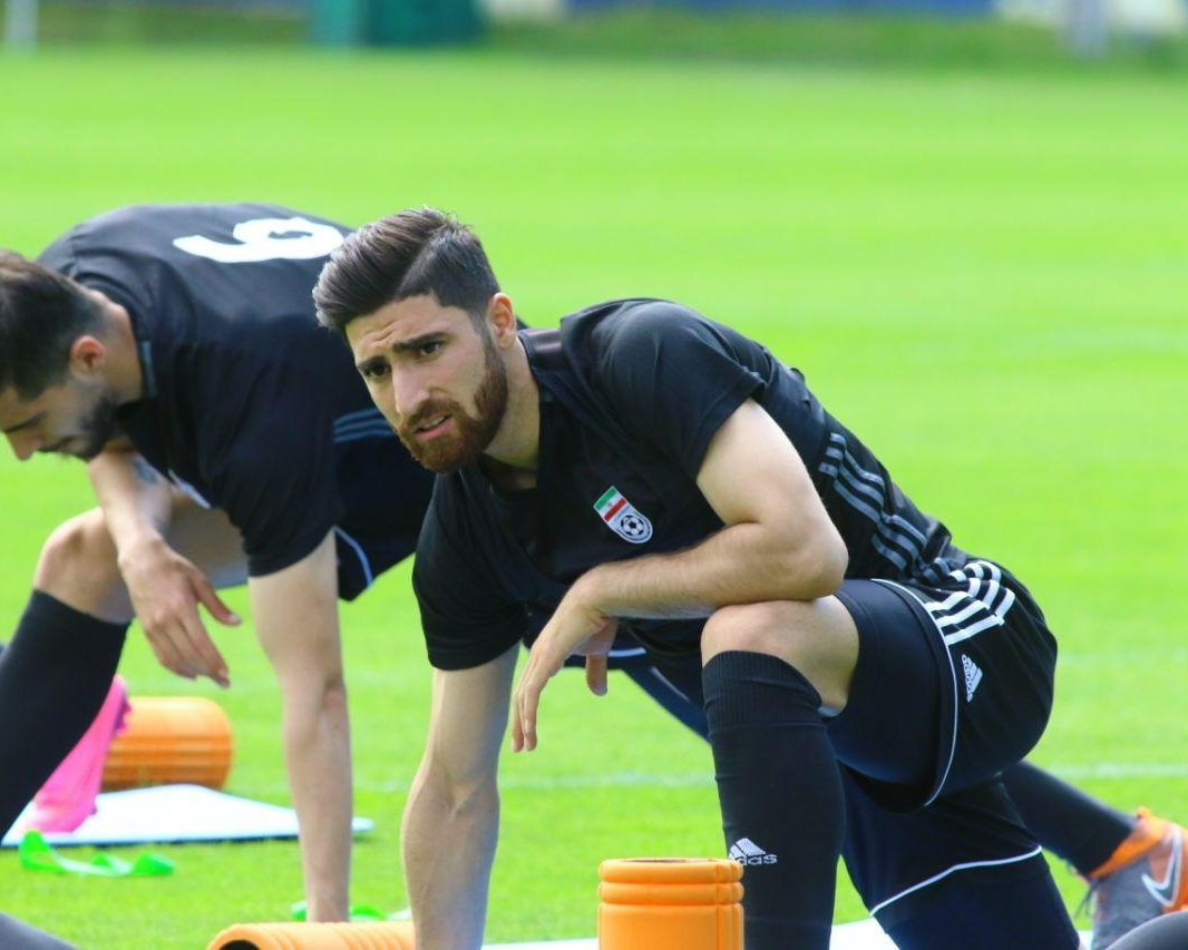 تصاویری از تمرین تیم فوتبال ایران